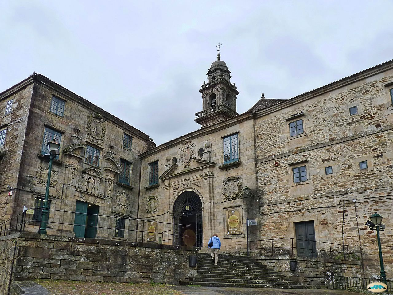 Santiago-San Domingos de Bonaval e Museo do pobo galego